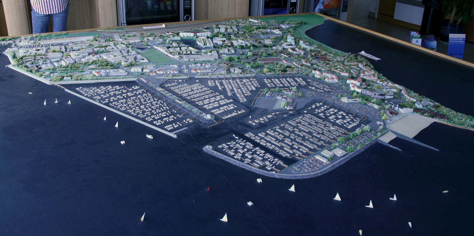 Les Minimes - Maquette du projet d'agrandissement